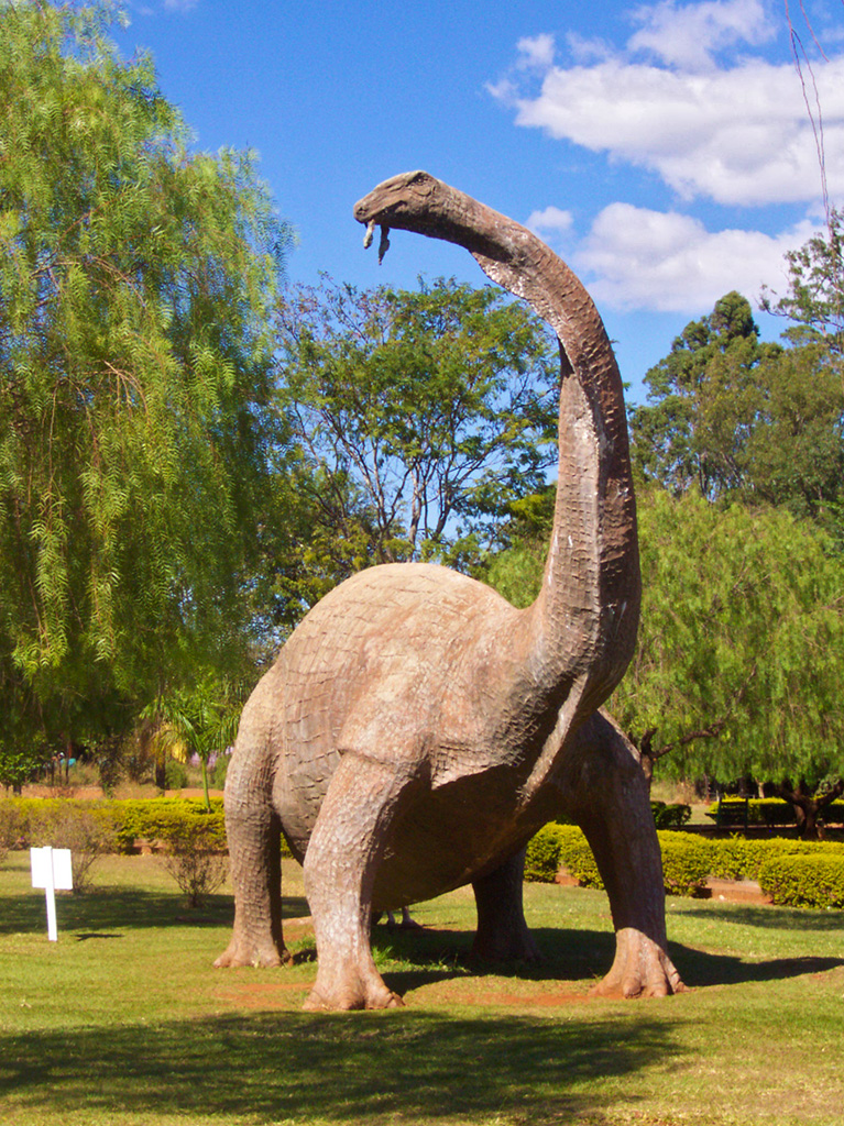 Réplica em tamanho natural de um Titanossauro, em frente ao Museu dos Dinossauros de Peirópolis, Uberaba, MG, Brasil